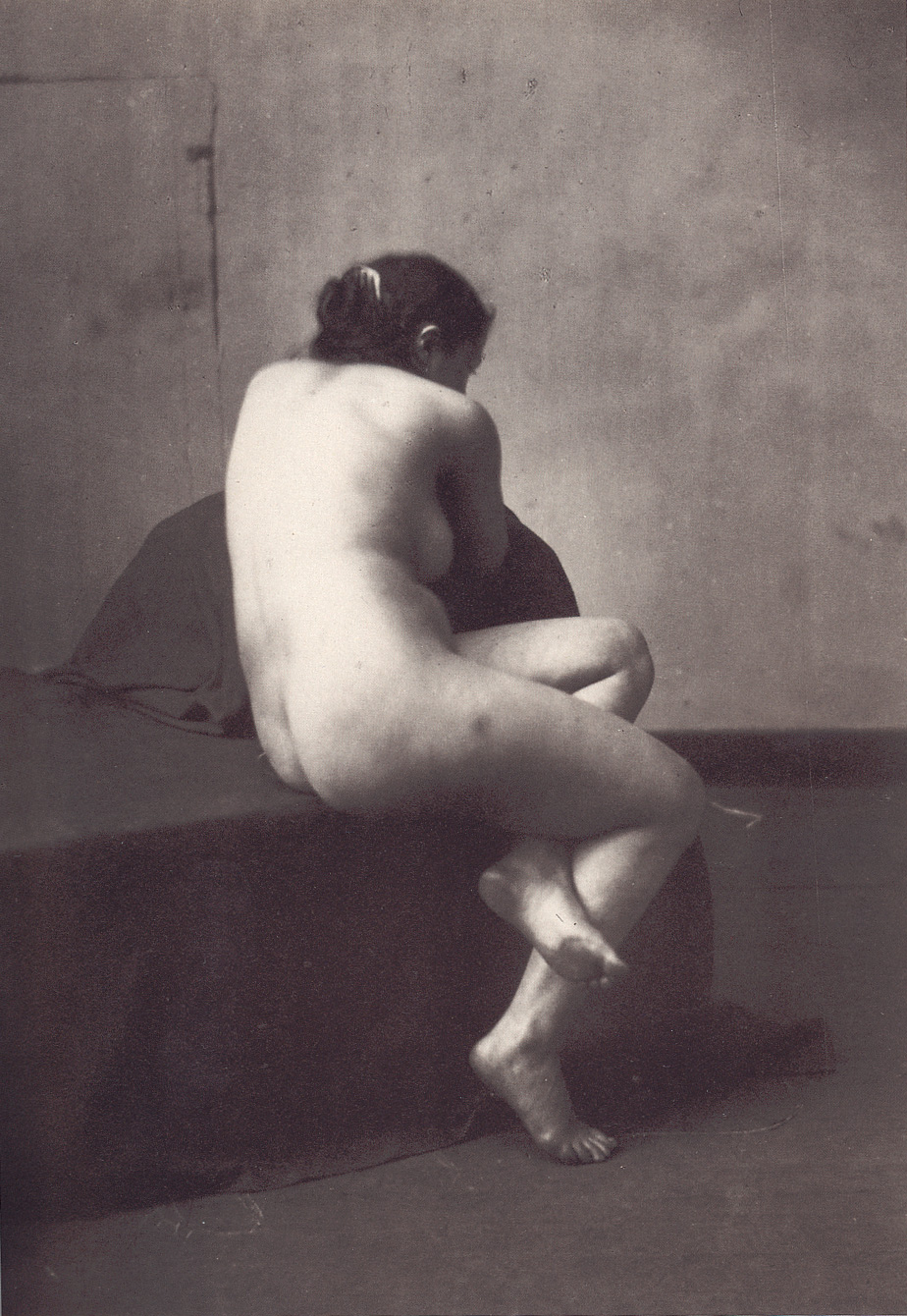 Rückenakt von Paul Marcellin Berthier